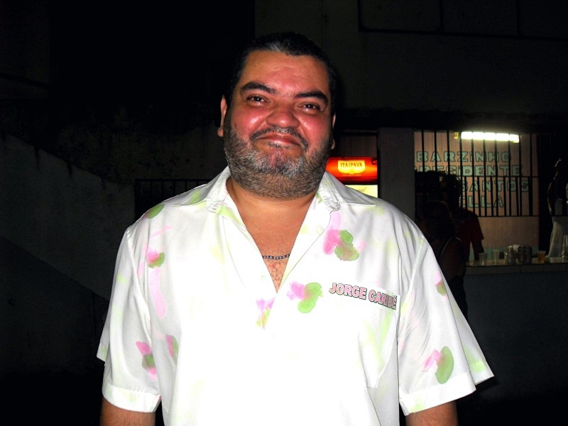 26-10-2009 Ensaio da Lins Imperial